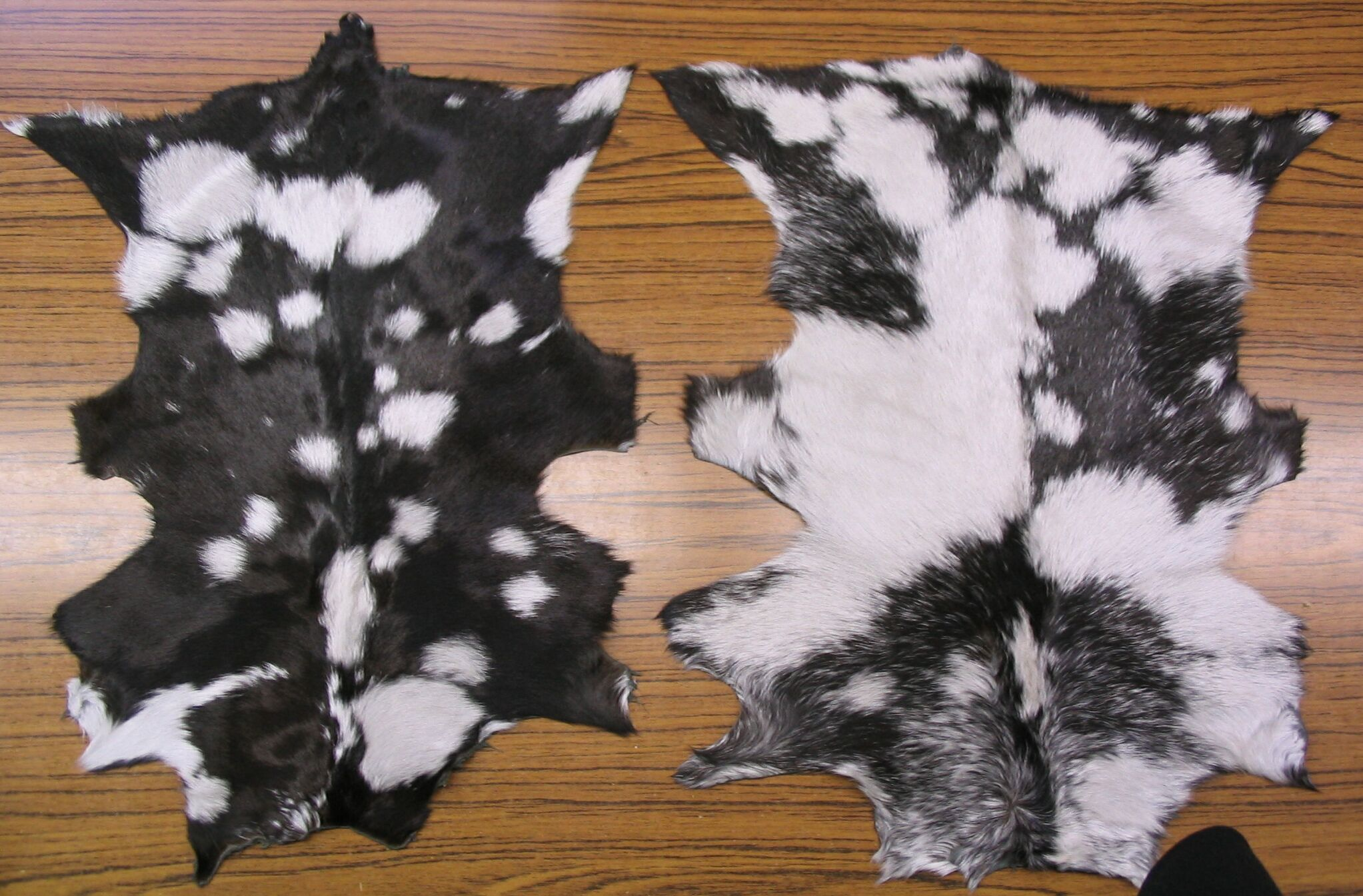 Kid skins, 2 Zickelfelle ohne Pfoten und Diechen (Fellbezeichnung im Rauchwarenhandel = Kid), Provenienz unbekannt